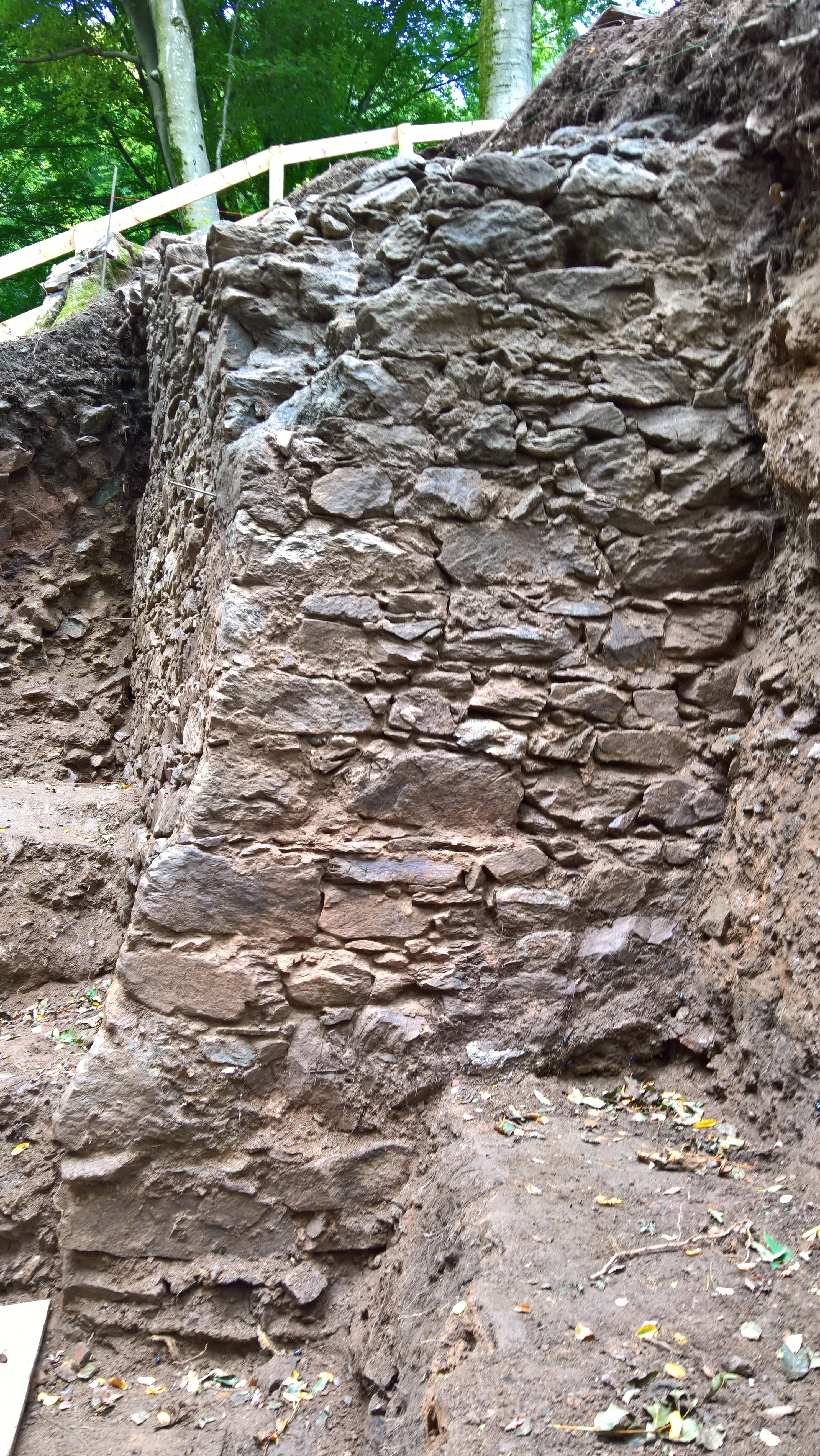 Ecke der inneren ergrabenen Burgmauer